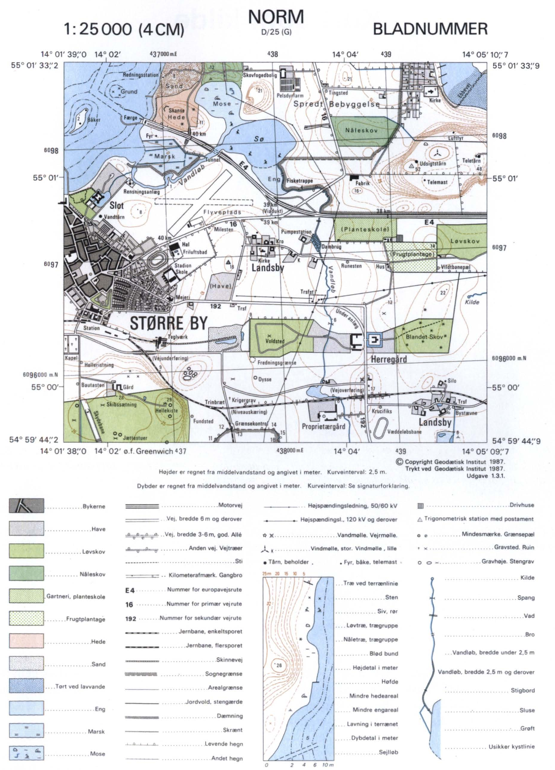 Signaturforklaring til graverede 4 cm kort (1980-2001)